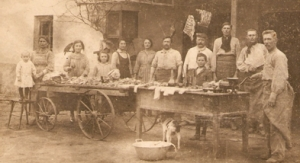 Familia tipica